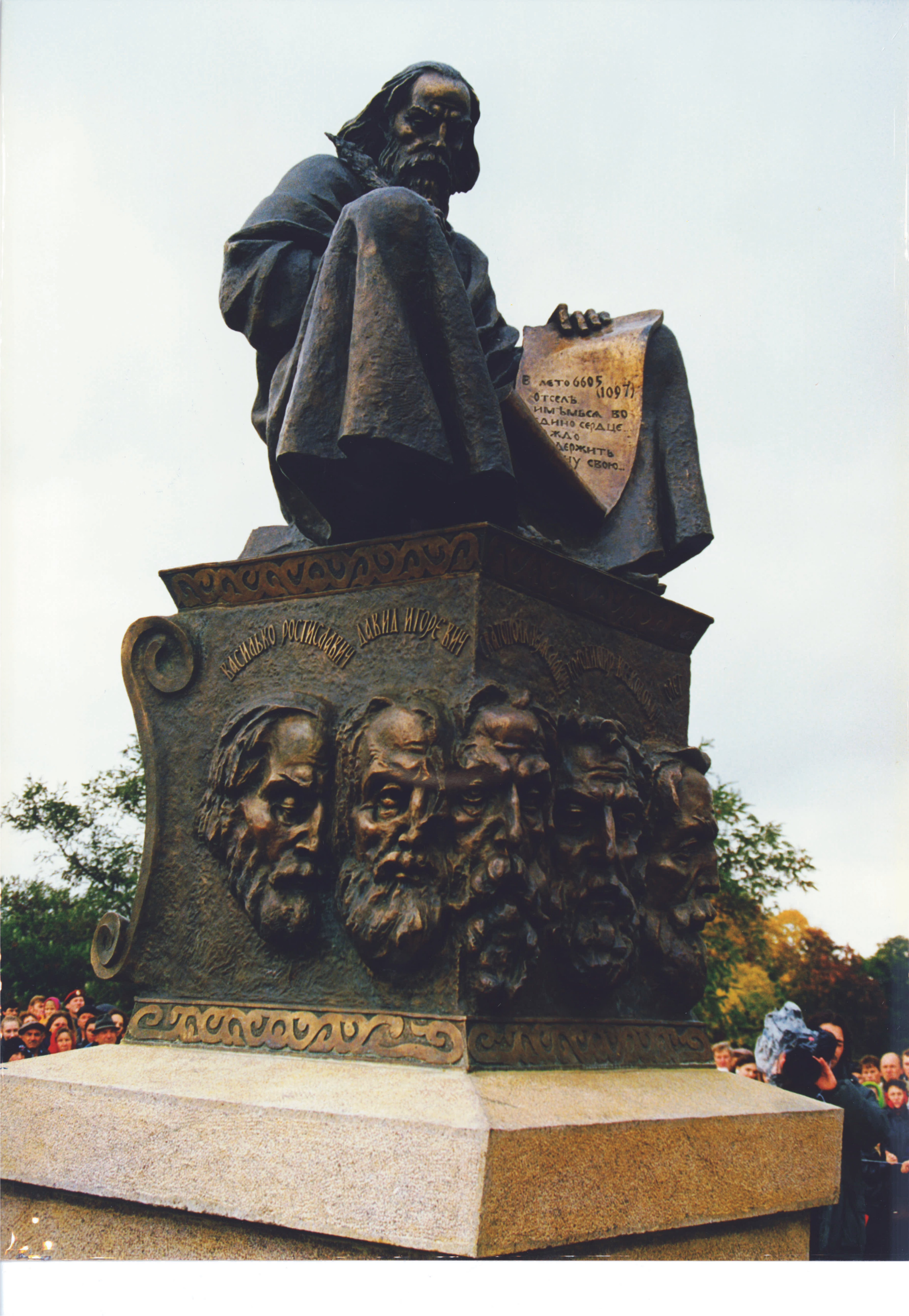 sculpture by Giennadij Jerszow (Gennadij Jerszow, Геннадій Олексійович Єршов)